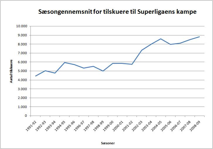 Oversigt over det sæsongennemsnittet for antal tilskuere i Superligaen fra 1991-92 til 2008-09